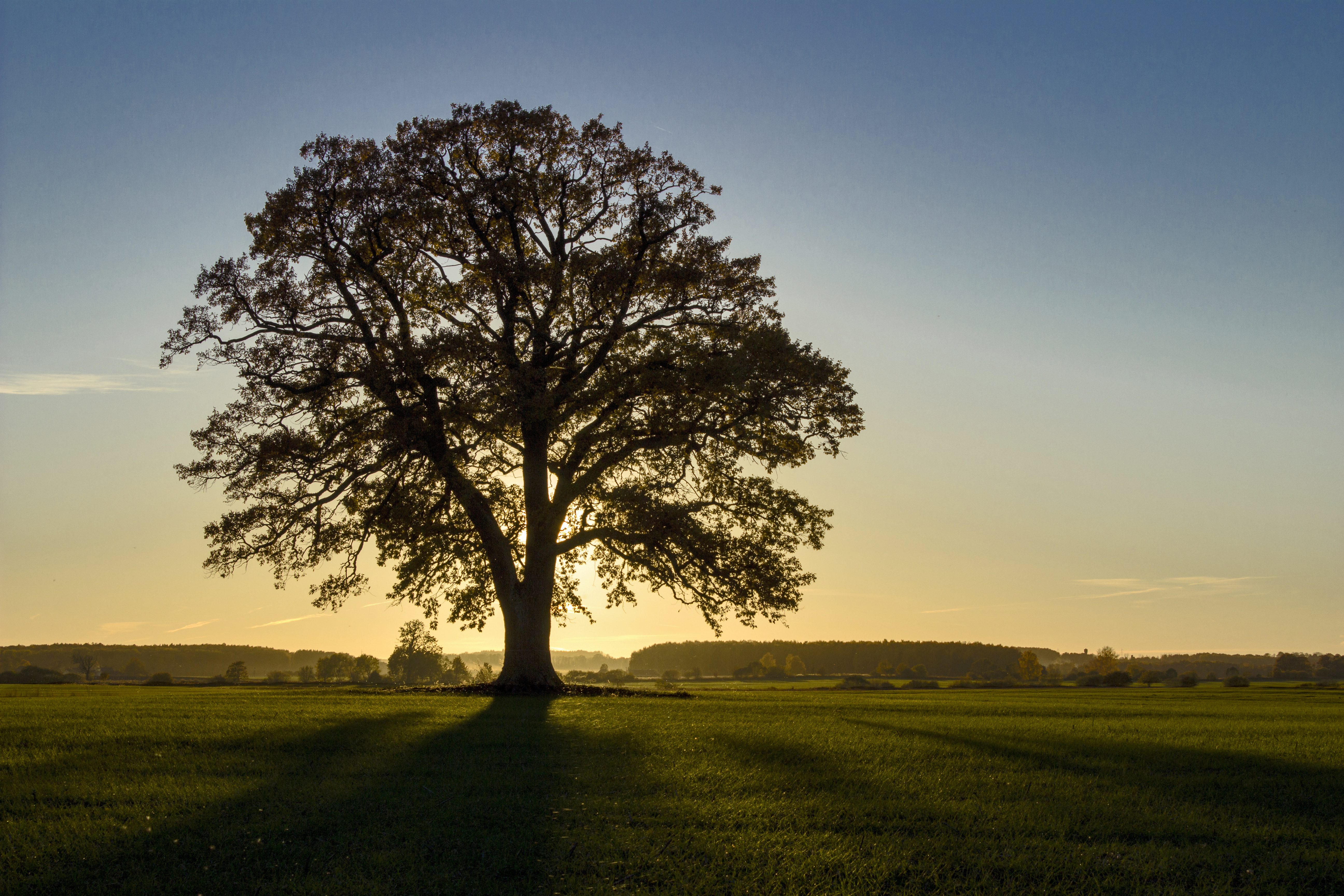 Vēveru ozols